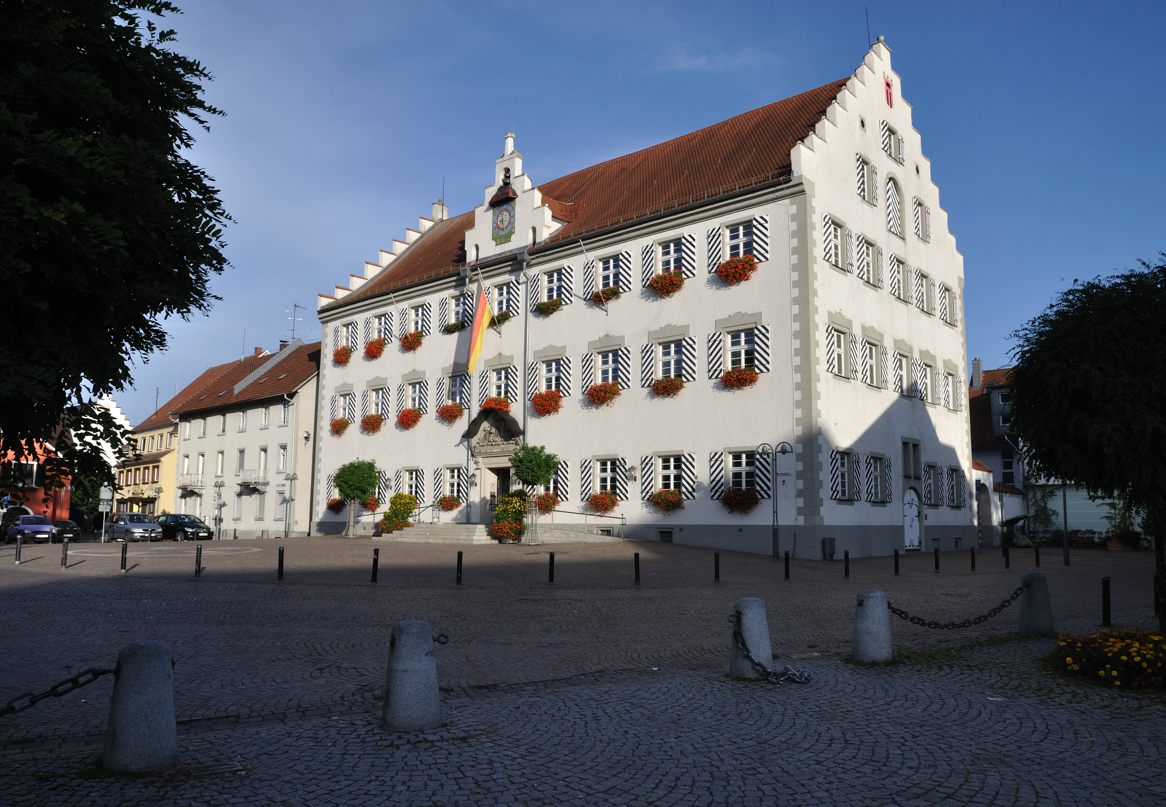 Altes Rathaus in Tettnang